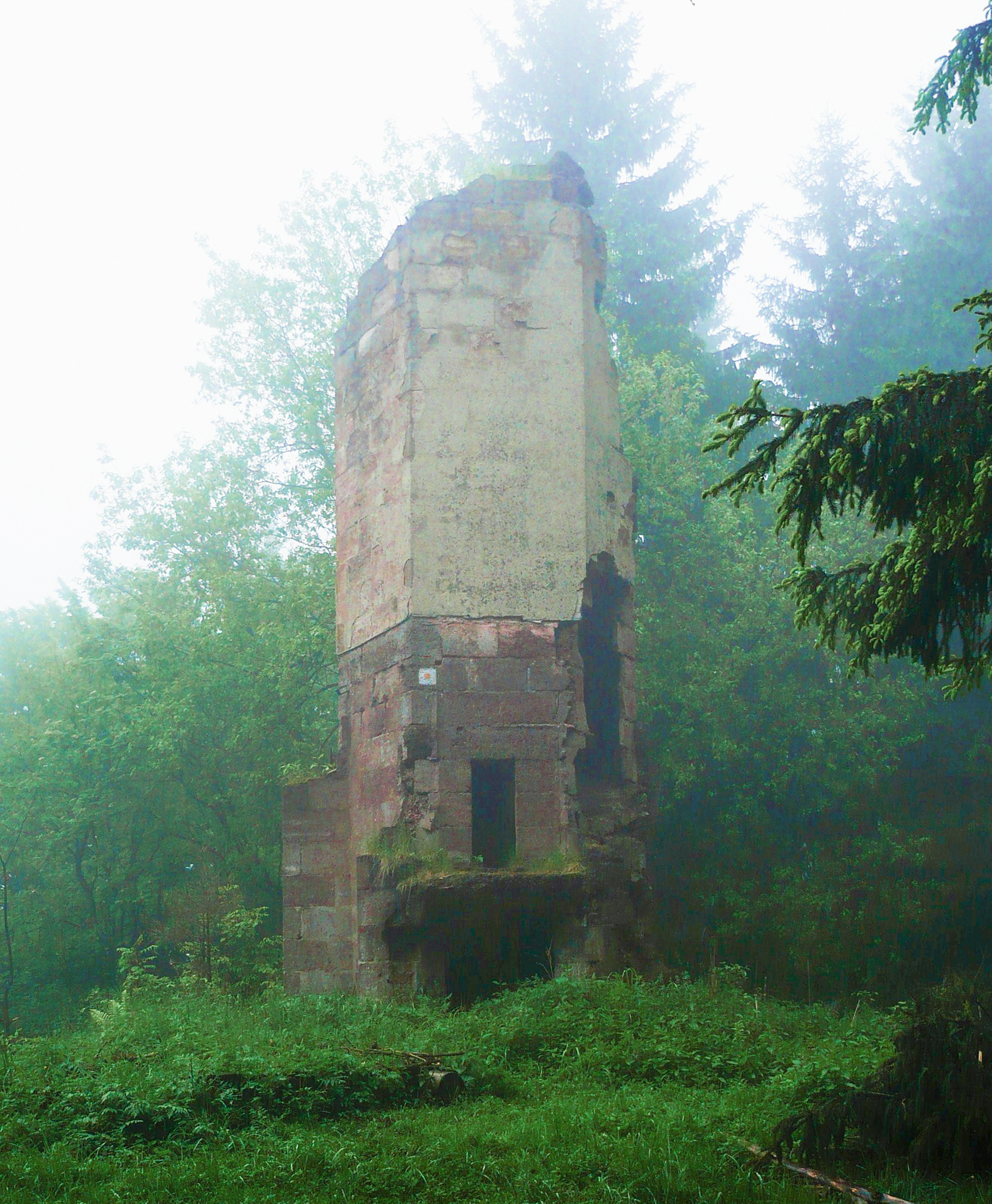 Włodzicka Góra. Wieża